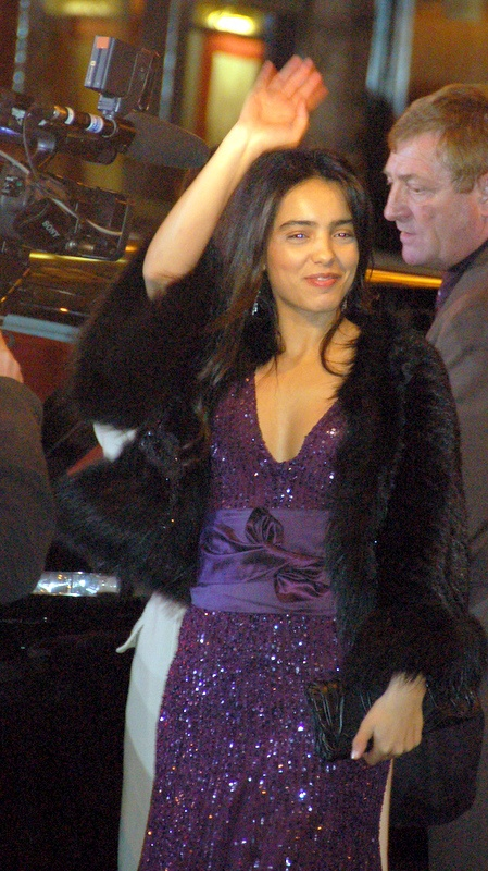 Hafsia Herzi à la cérémonie des Césars 2008